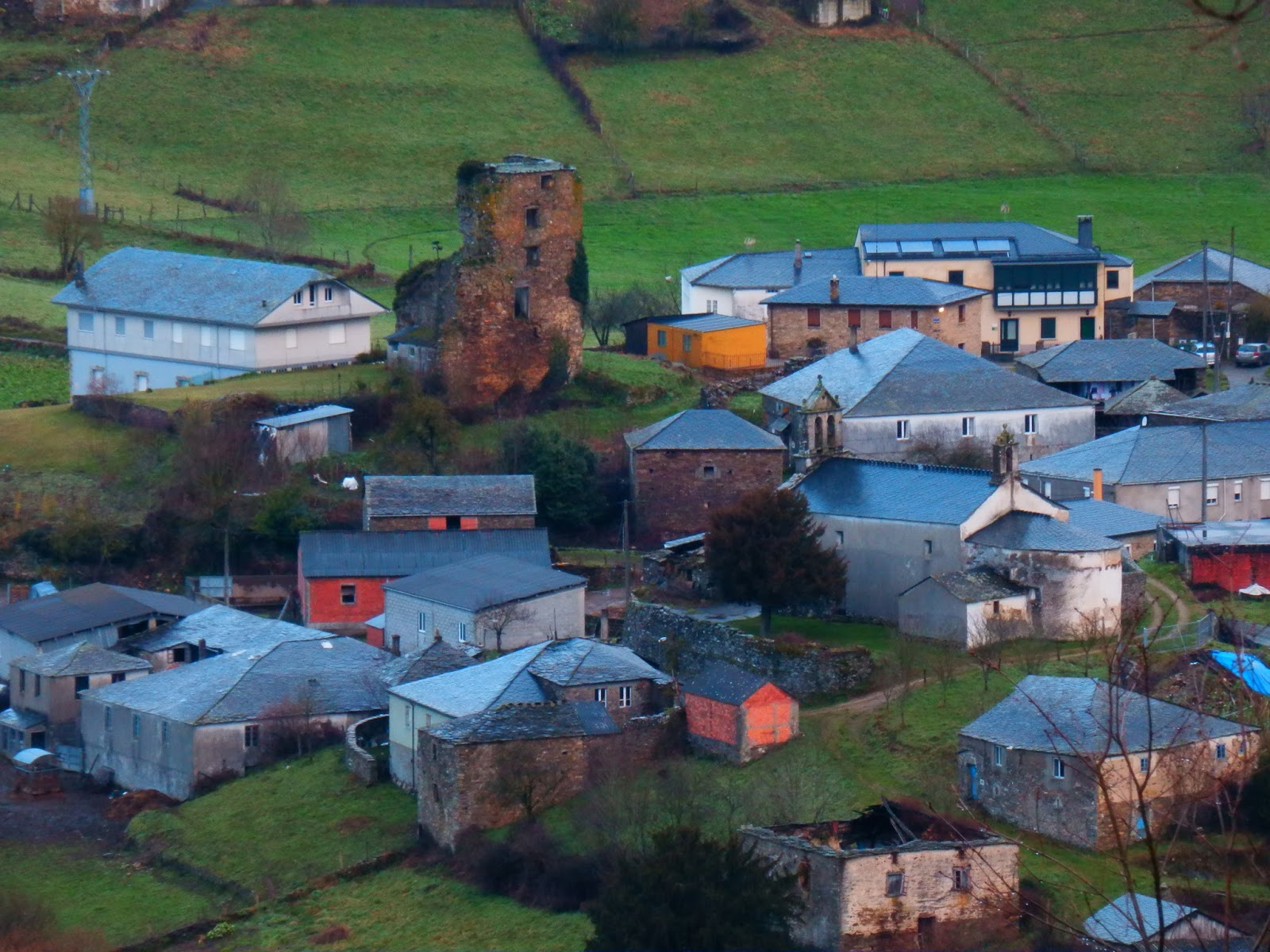 A Proba de Burón, coa torre do castelo de Altamira, A Fonsagrada.